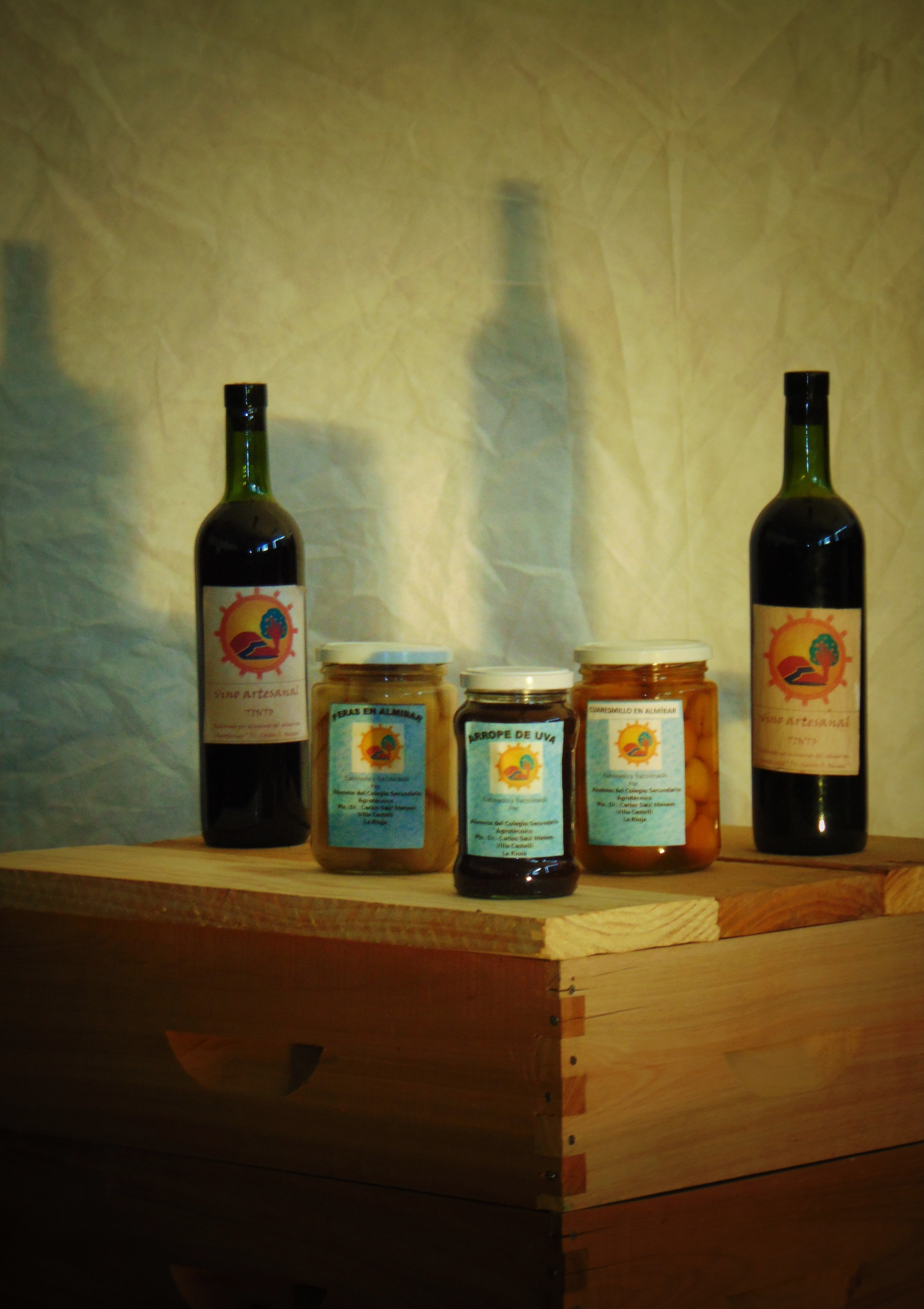 Composición en el estudio con productos regionales.